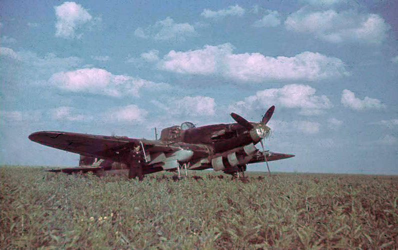 Abgeschossener und notgelandeter sowjet. Flieger, Herbst 1942, Ukraine